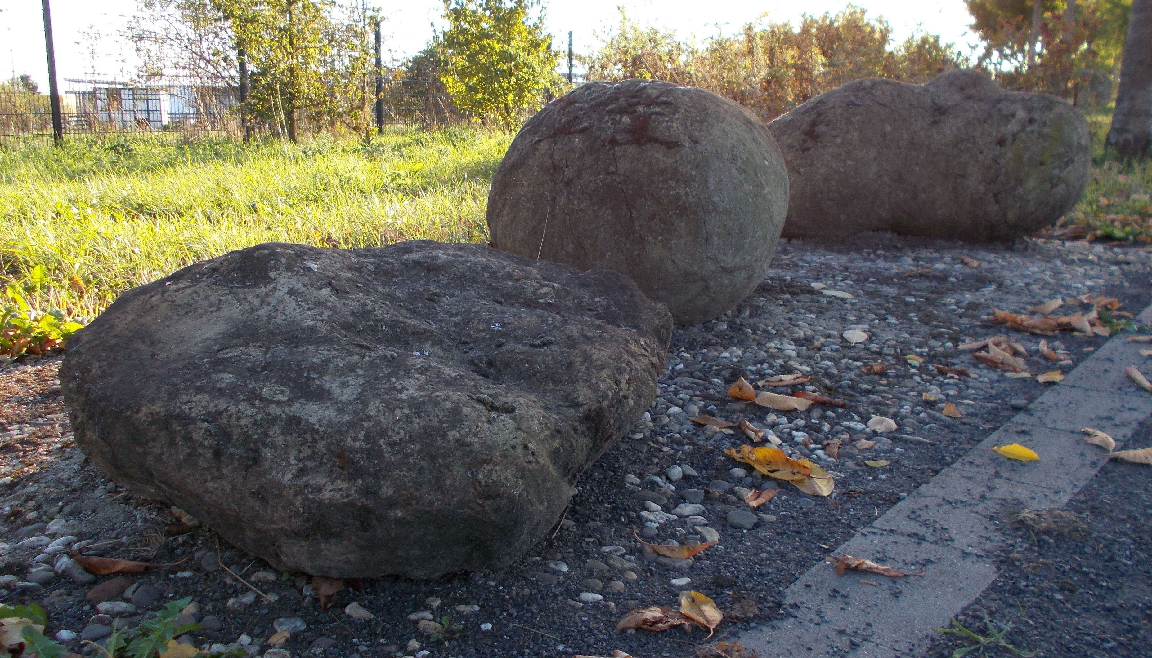 Findlingsweg Sonsbeck Station 2: Tertiärer Feinsandstein